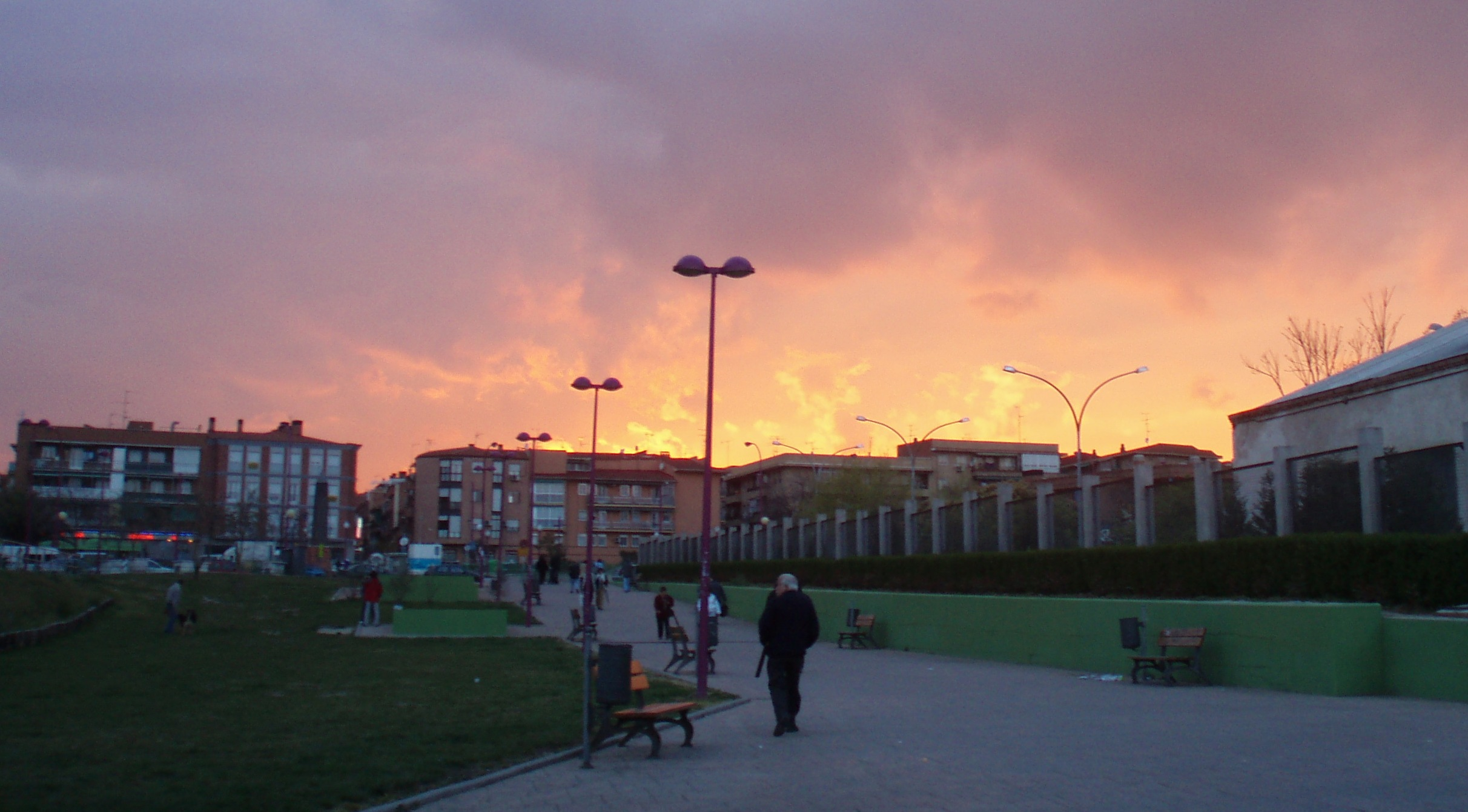 Atardecer en el barrio de La Alhóndiga, en Getafe, Comunidad de Madrid, España.